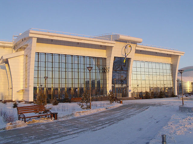 Теннисный корт в Караганде